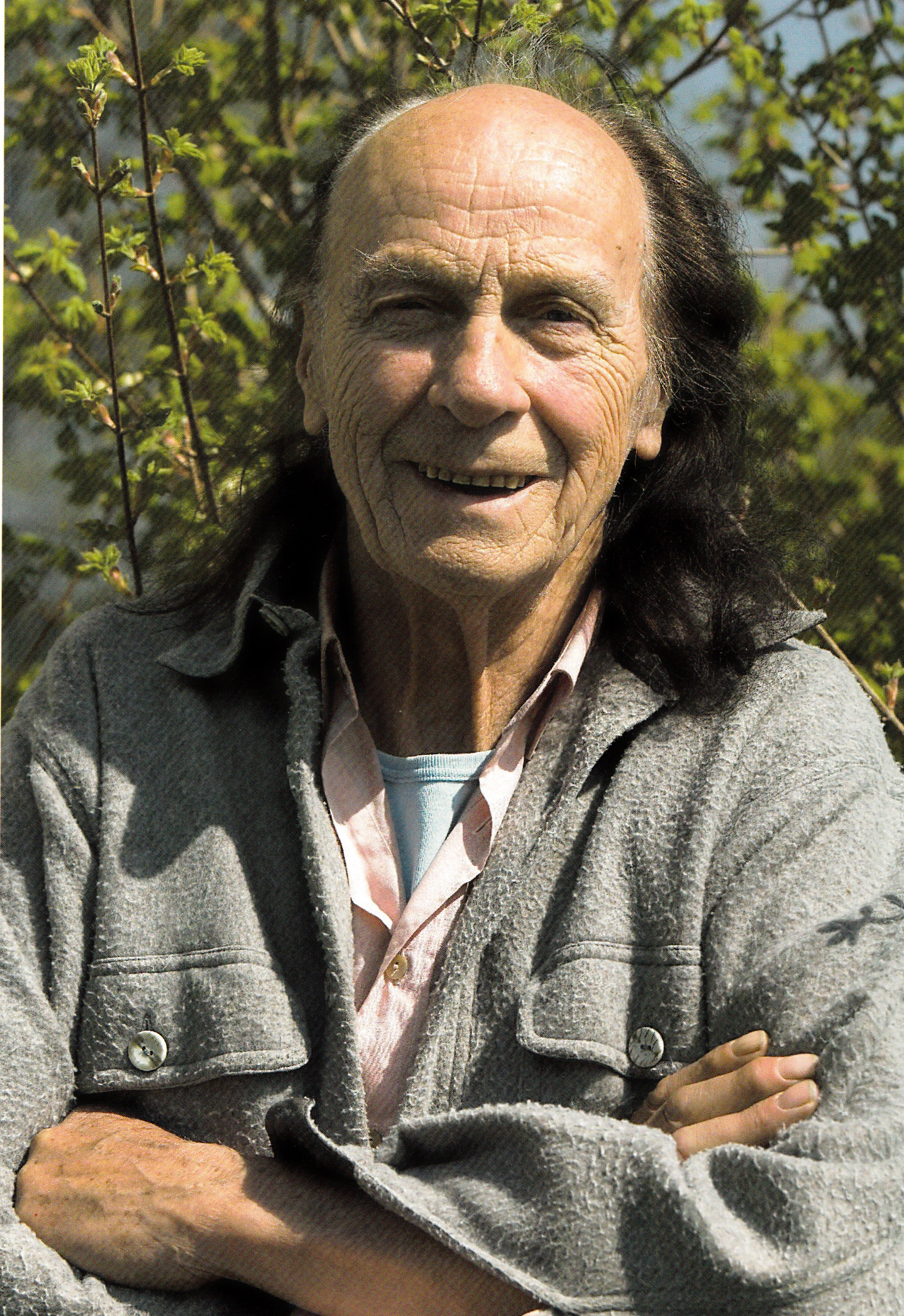 Portrait von Helmut Braig